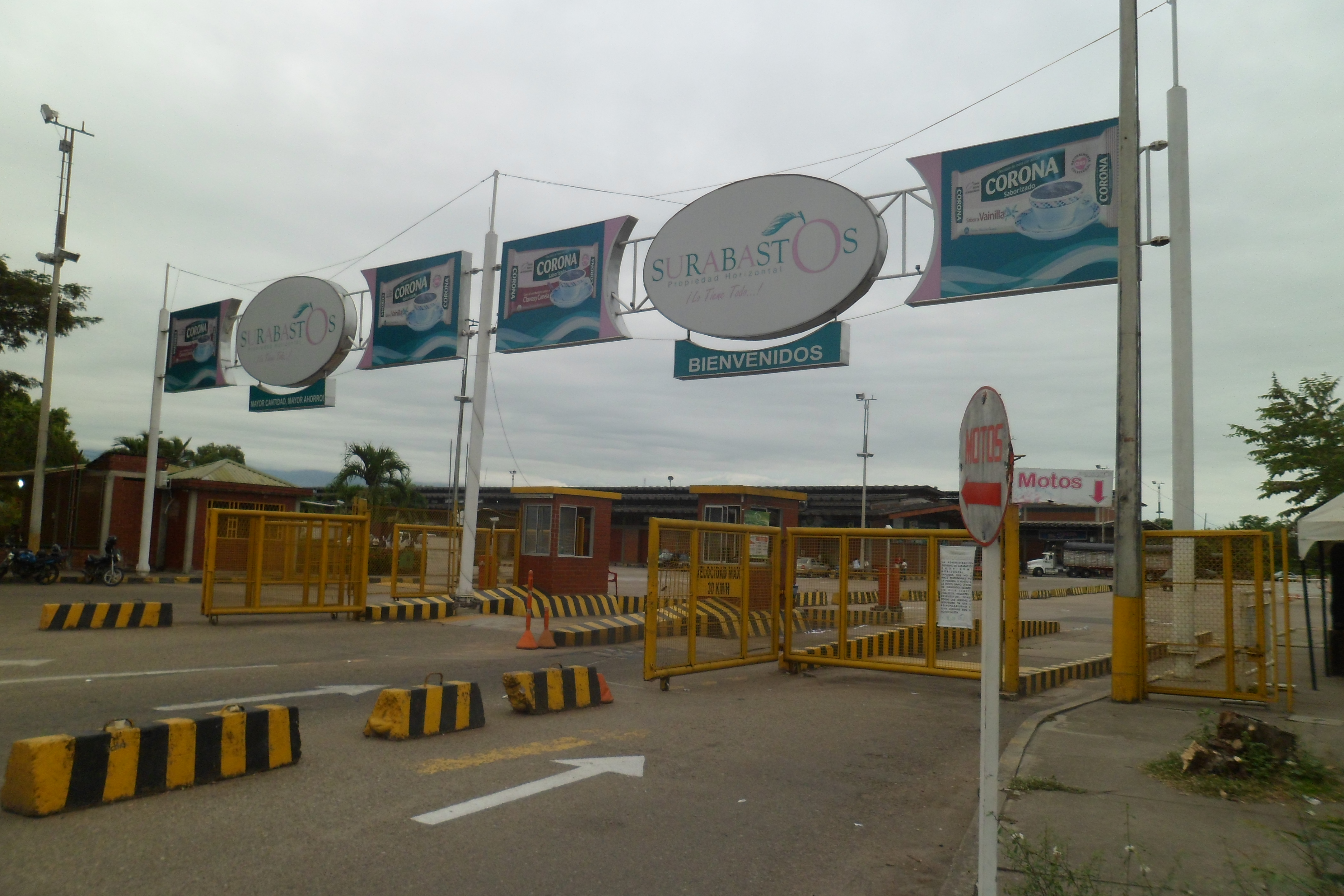 Surabastos Neiva, Huila